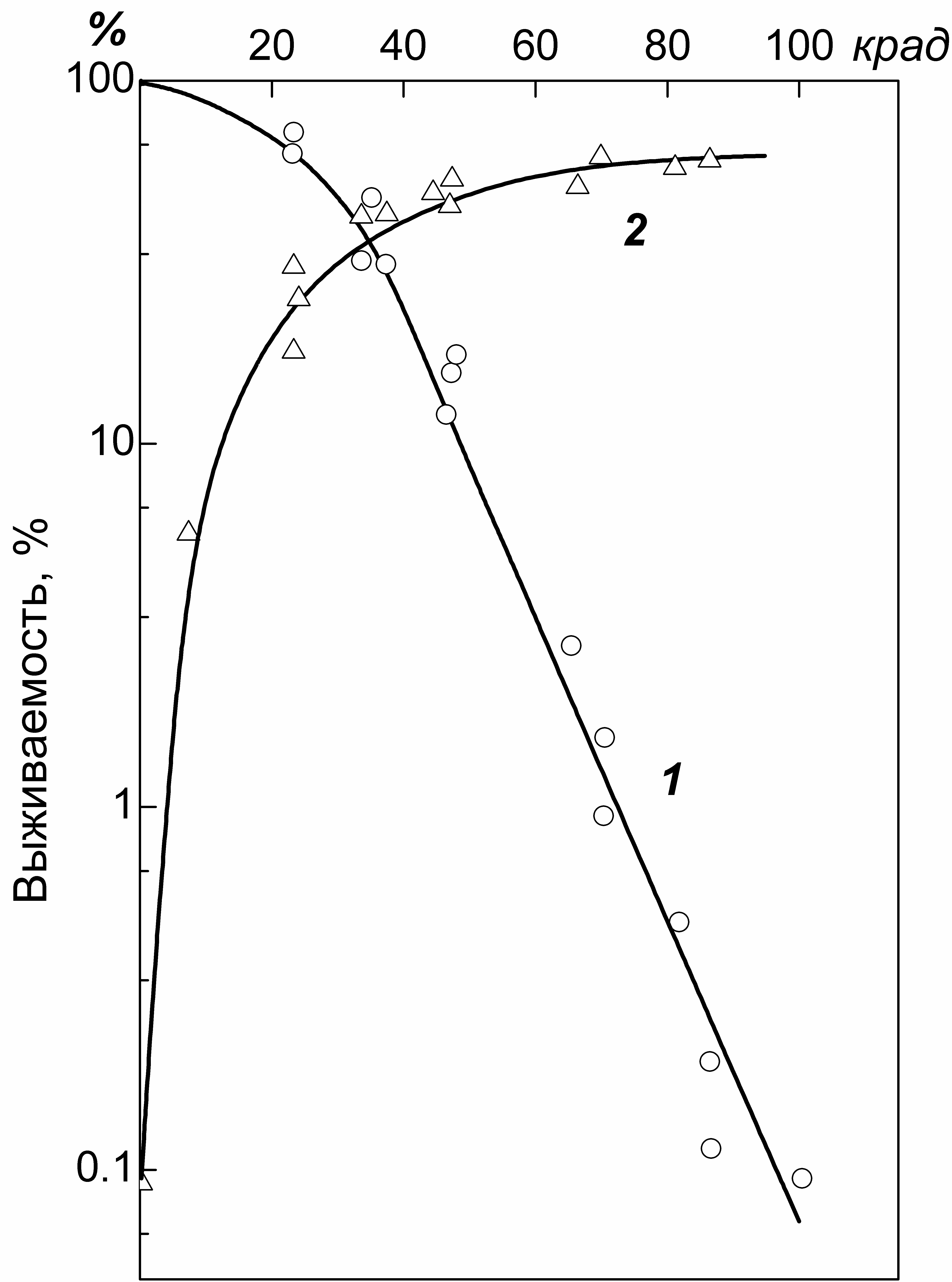 Выживаемость (1) и относительное количество сальтантов (2) среди выживающих клеток , теоретический расчет выхода стабильных клонов (3) в зависимости от дозы облучения . По оси абсцисс — доза облучения, крад; по оси ординат — выживаемость или относительное количество сальтантов, %.